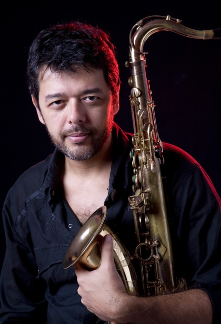 Alexandre Caldi, saxofonista, flautista, arranjador e compositor